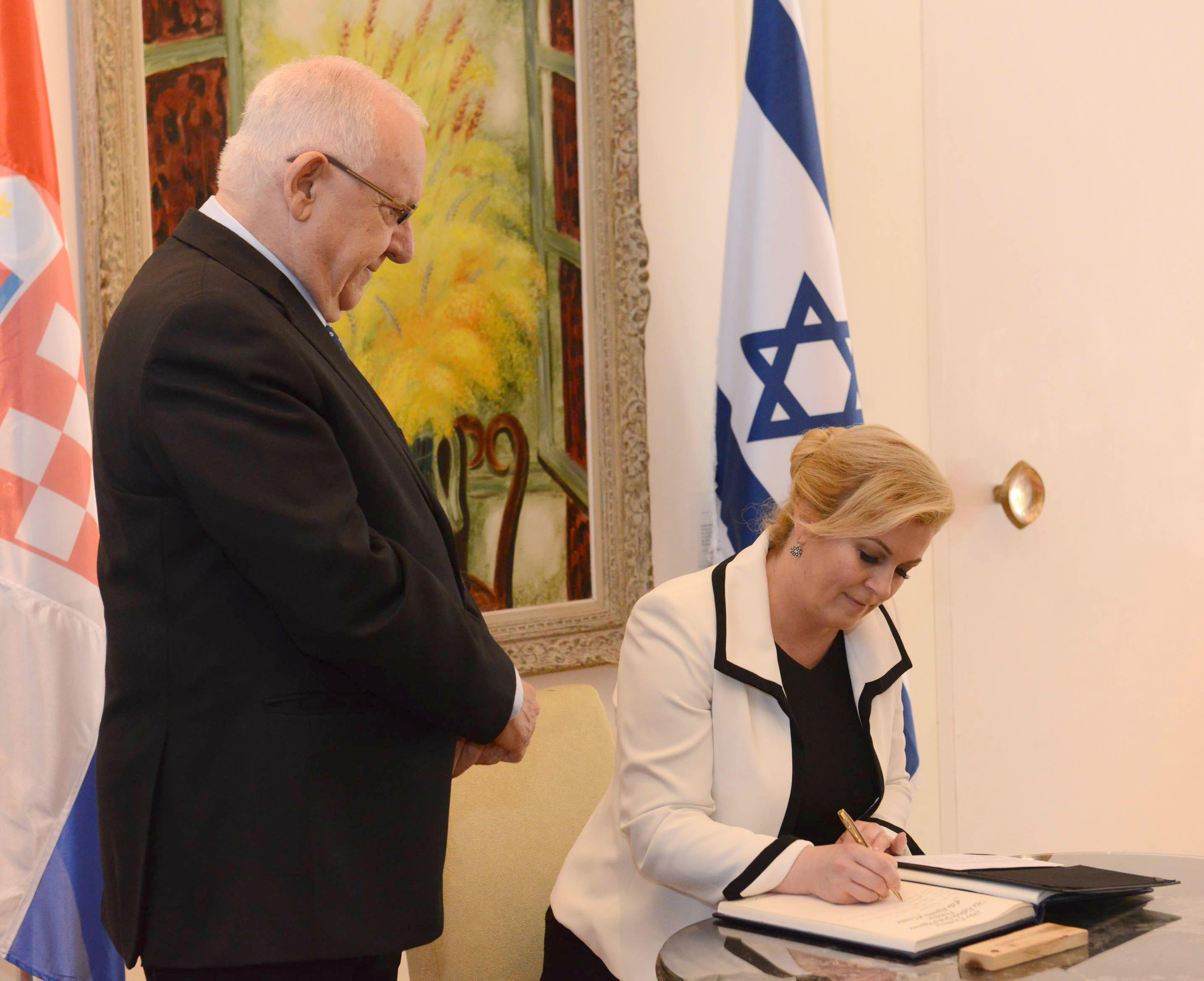 קולינדה גרבר-קיטרוביץ' נשיאת קרואטיה בביקור בישראל ביחד עם נשיא מדינת ישראל ראובן ריבלין